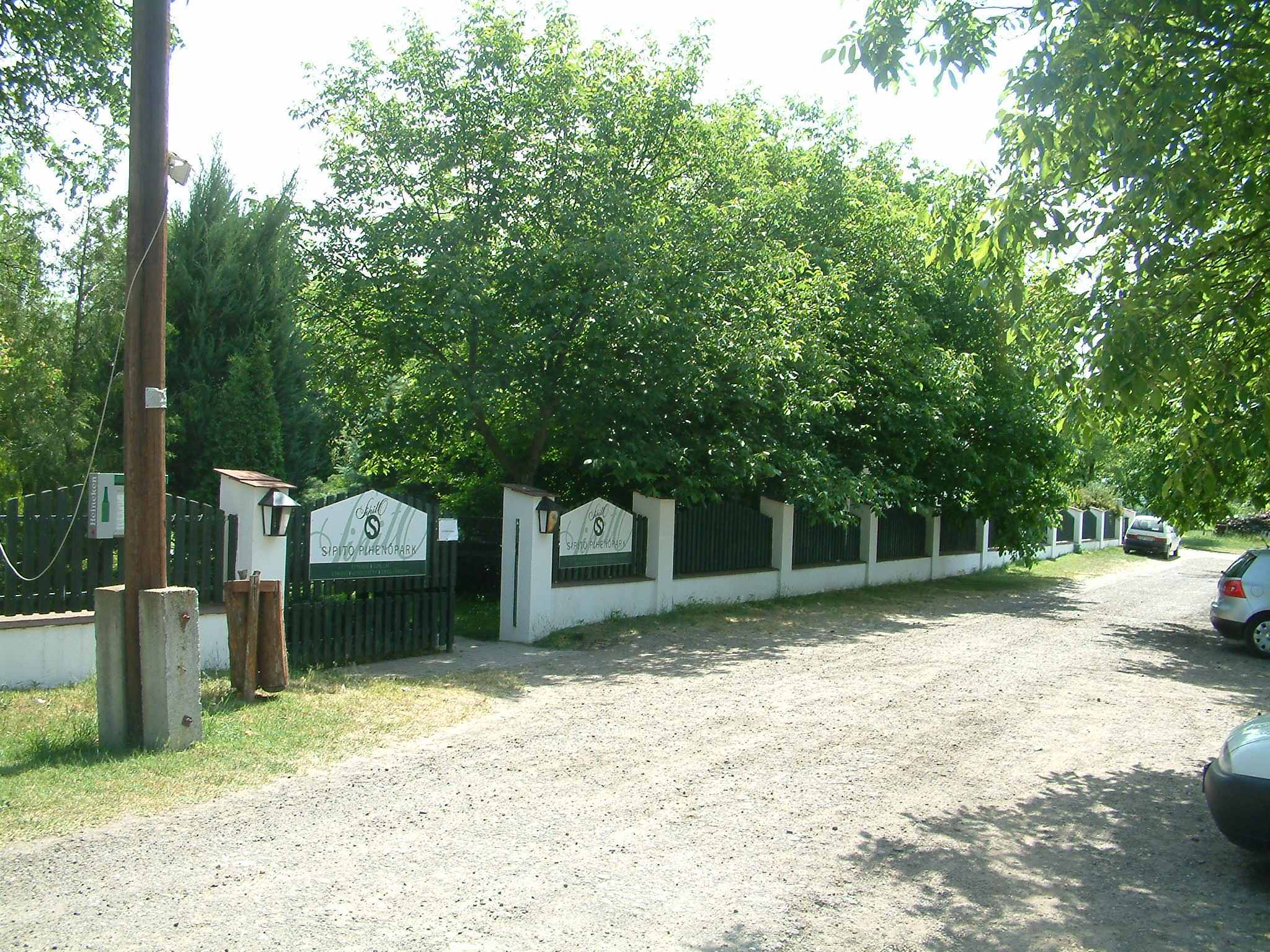 A Sipító pihenőpark főbejárata